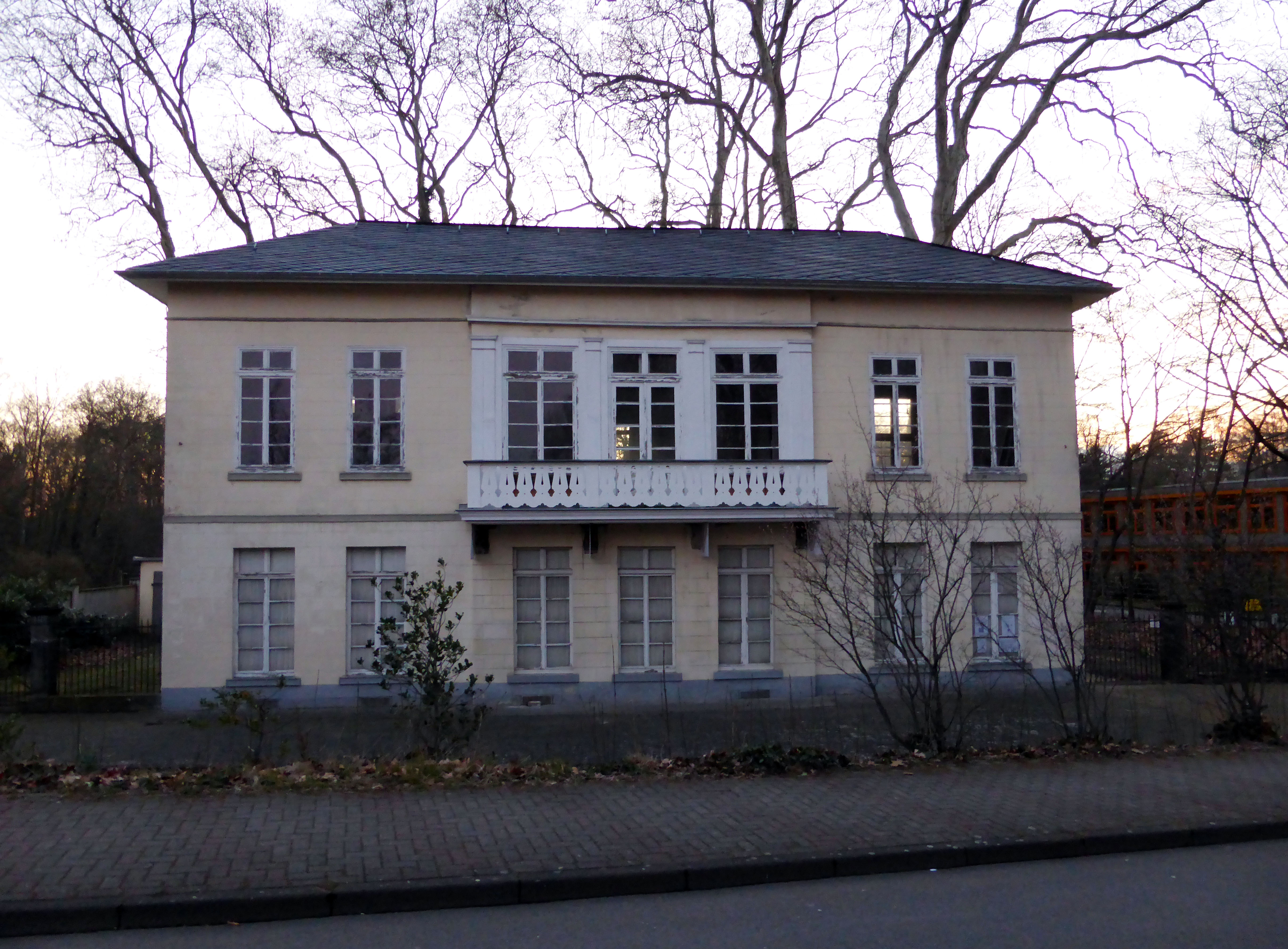 Stolpersteine: Bahnhof Belvedere, Belvederestraße 147, Köln